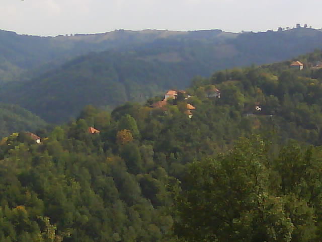 Autor:Nenad Marković